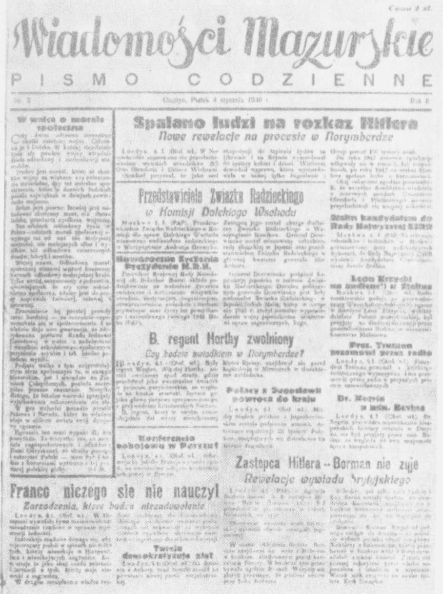 Głos Ziemi. Wydanie z 4 stycznia 1946.